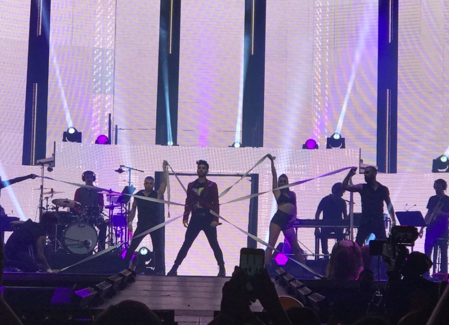 Agoney hernandez morales cantando eloise con sam vazquez y otros bailarines de ot biskaia arena 24-6-18